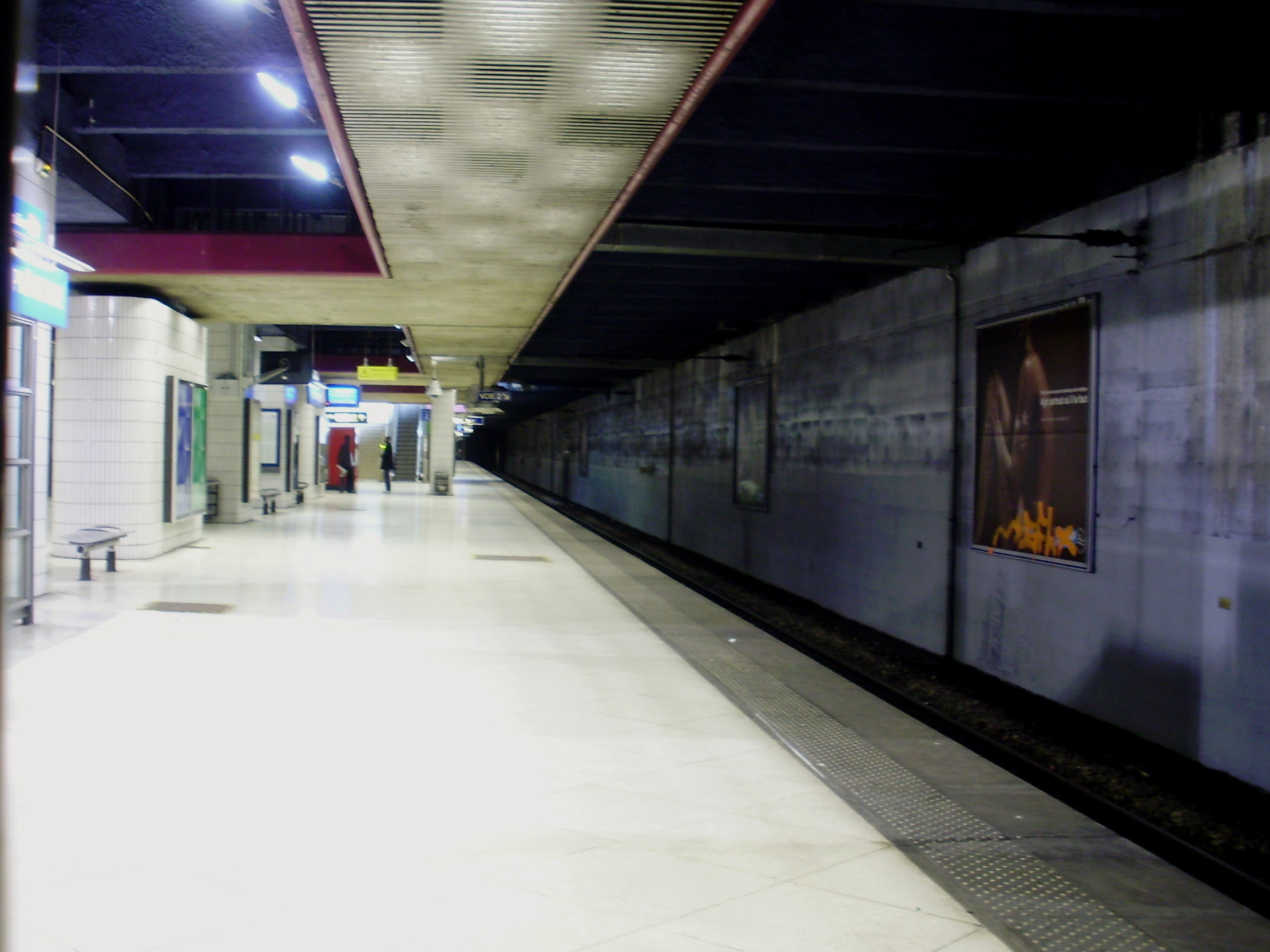 Gare de Cergy-Préfecture, à Cergy, Val-d'Oise, France : quai pour la direction de Cergy-Le Haut depuis la tête du quai